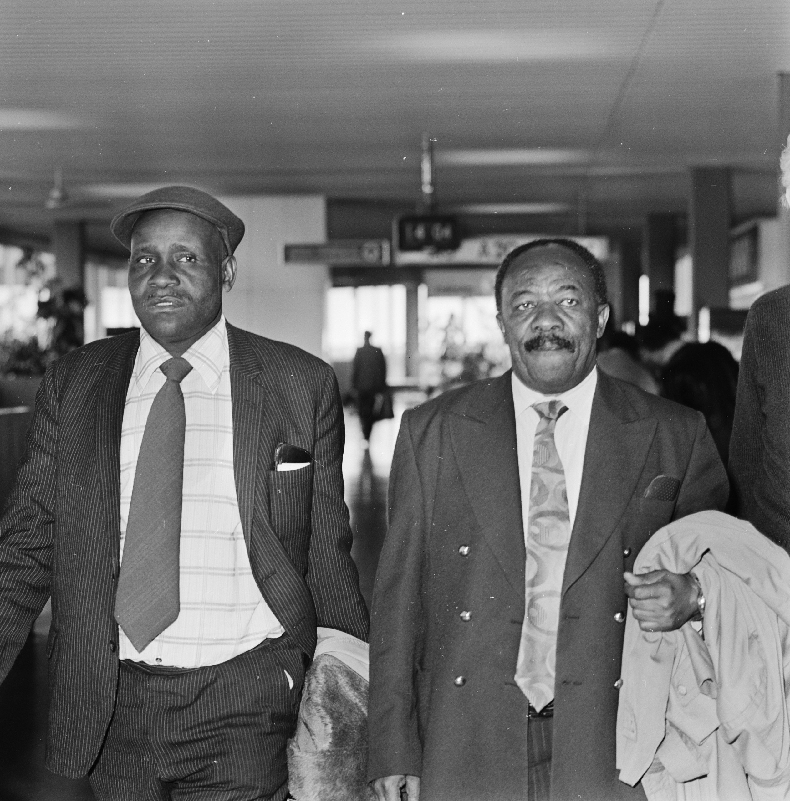 Collectie / Archief : Fotocollectie Anefo Reportage / Serie : [ onbekend ] Beschrijving : Aankomst Schiphol leiders Zuid Afrikaanse bevrijdingsleger ANC, Alfred Nzo en Thomas Nkobi (met pet) Datum : 3 oktober 1977 Locatie : Noord-Holland, Schiphol Trefwoorden : legers, leiders Persoonsnaam : ANC Fotograaf : Croes, Rob C. / Anefo Auteursrechthebbende : Nationaal Archief Materiaalsoort : Negatief (zwart/wit) Nummer archiefinventaris : bekijk toegang 2.24.01.03 Bestanddeelnummer : 929-3734